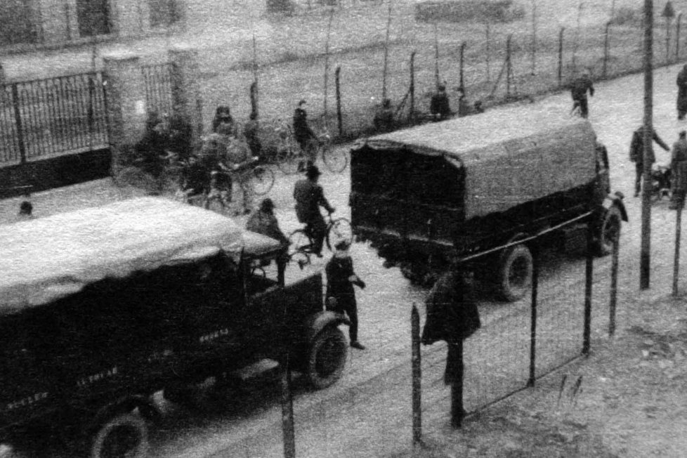 Eccidio delle Fonderie Riunite